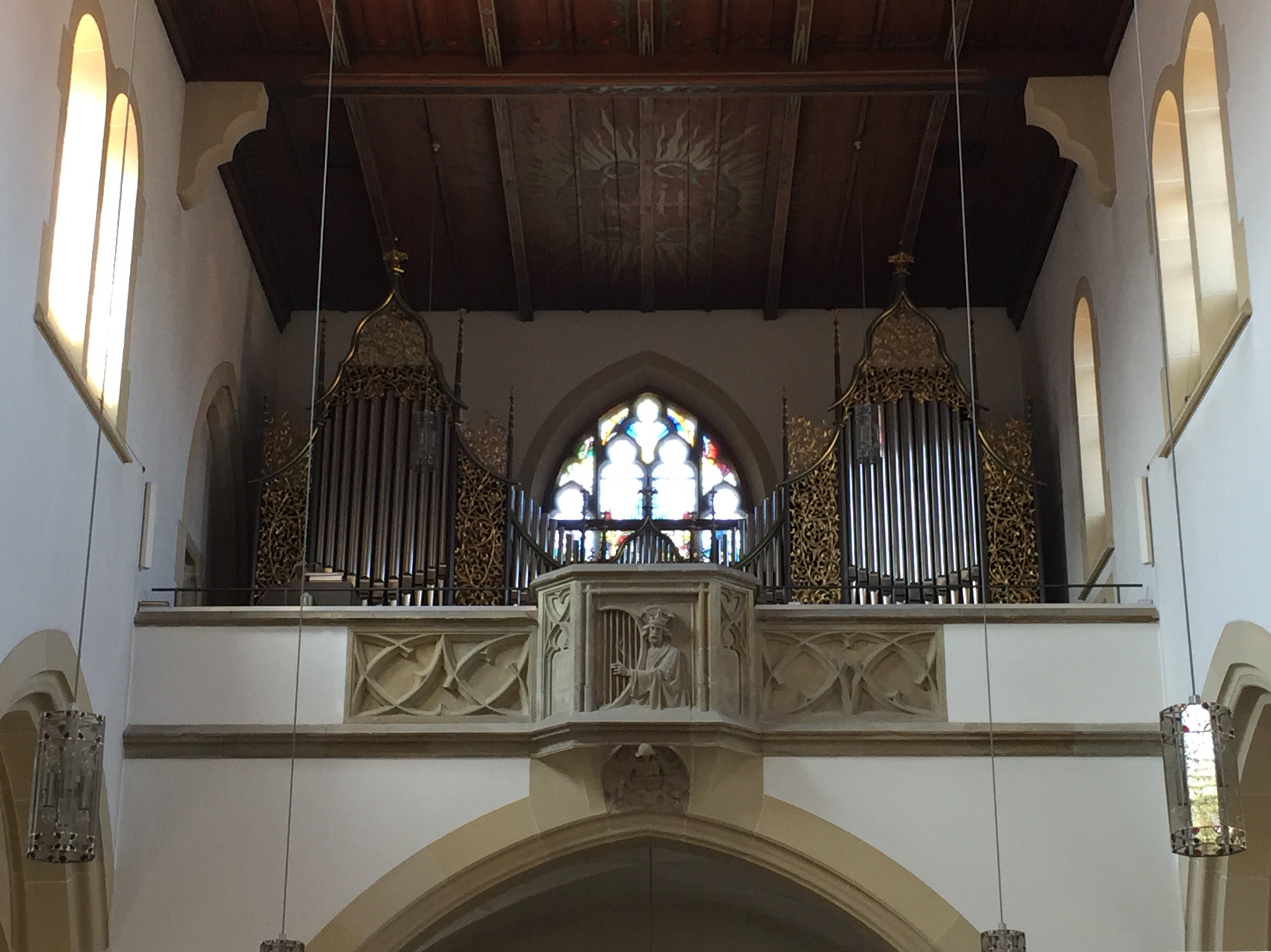 Die Orgel